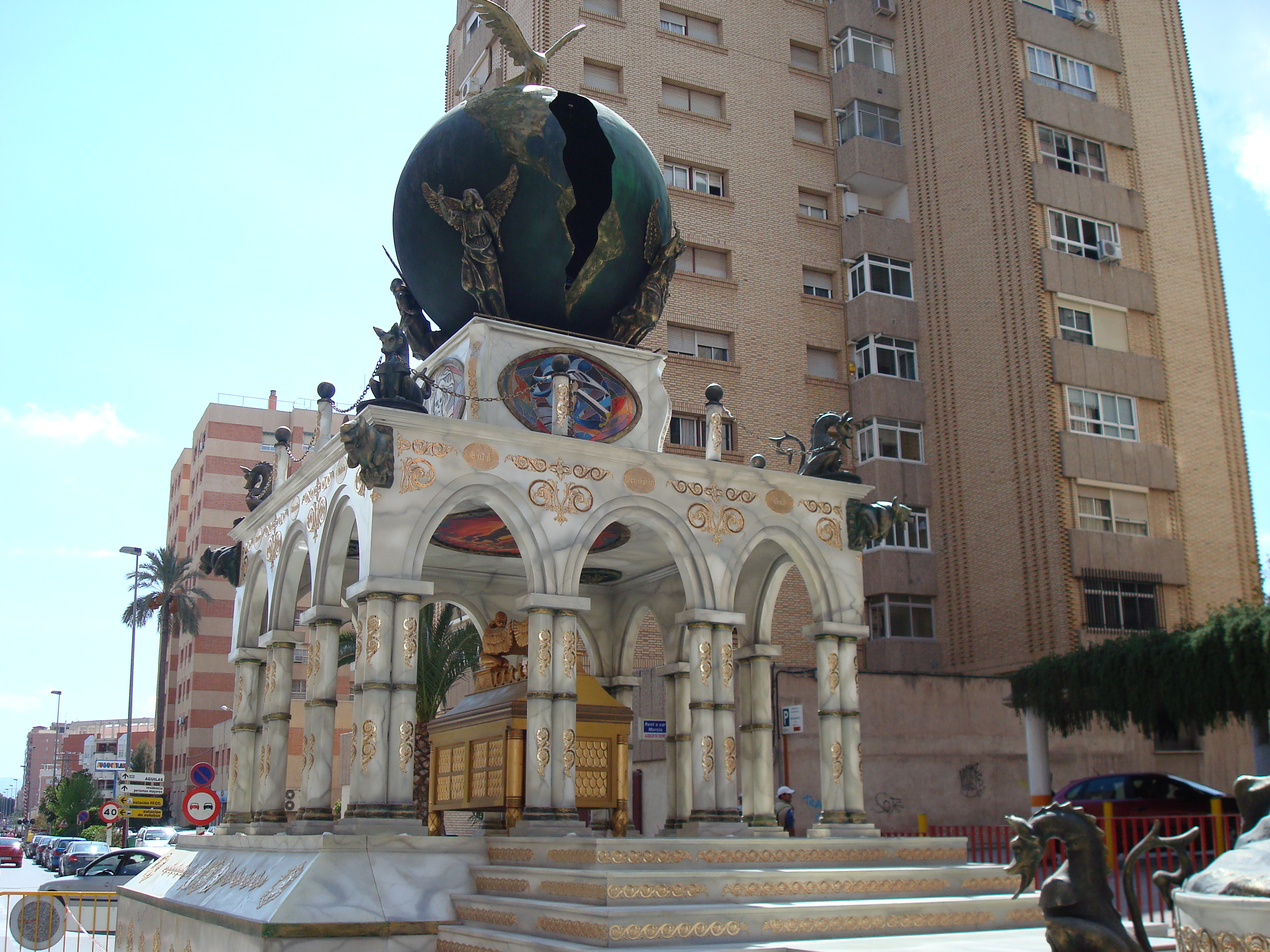 Carroza de la visión de San Juan, conocida como "la bola", Paso Blanco, Semana Santa Lorca